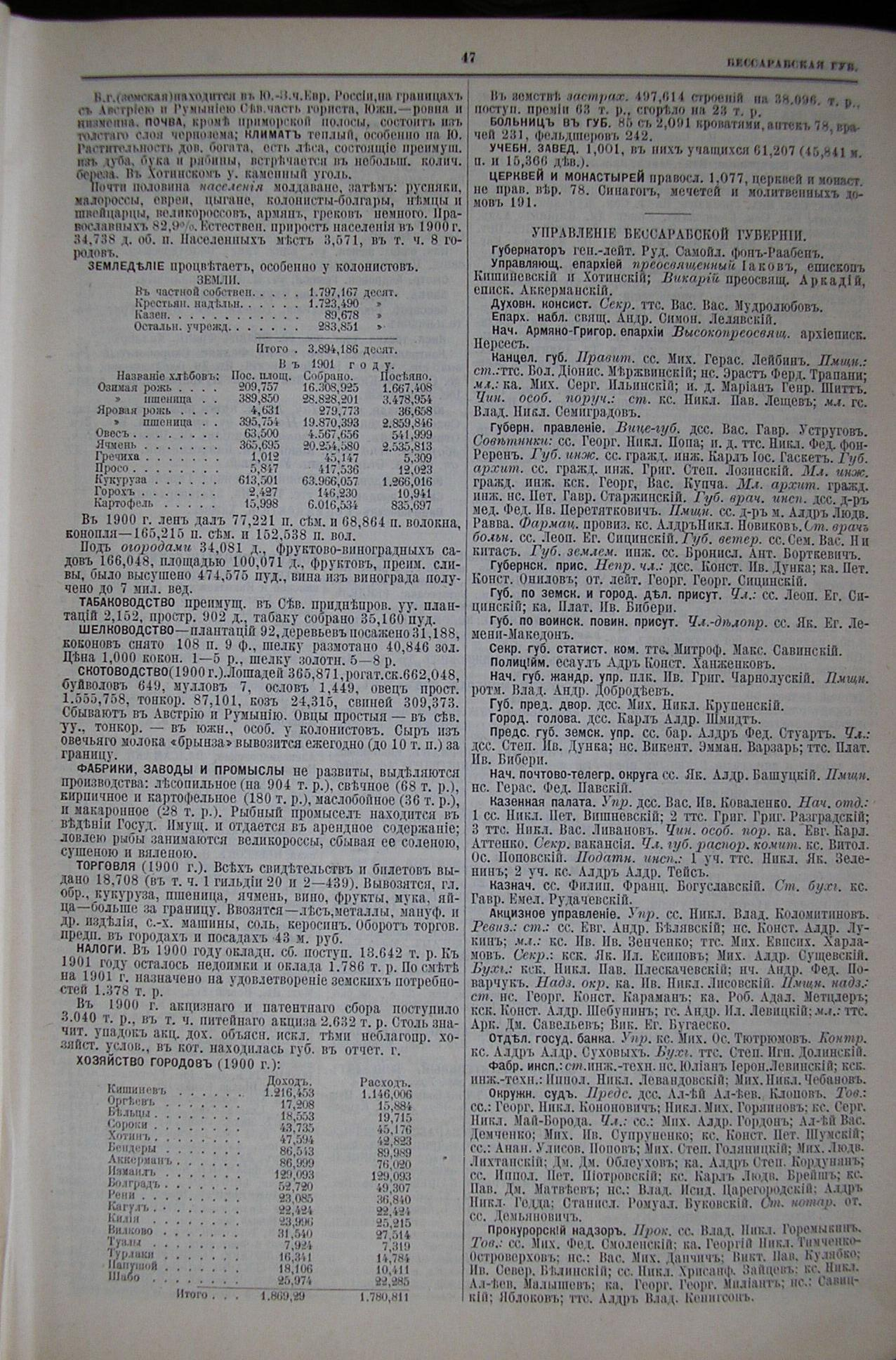 Стр. 47 из адрес-календаря Российской империи "Вся Россия", 1902.